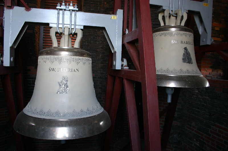 Dzwony w Głogowskiej Kolegiacie